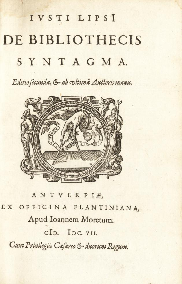 Ivsti LipsI de bibliothecis syntagma